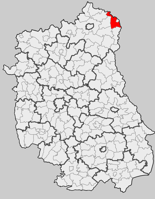 Map of gmina Terespol (rural), Biała Podlaska county, Lublin voivodship Mapa gminy Terespol (wiejska), powiat bialski, województwo lubelskie